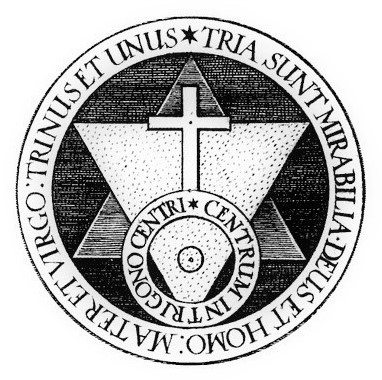 Raffigurazione dello stemma rosacrociano situato sopra la Porta Magica in Roma, tratta da un'incisione di Henry Carrington Bolton, su The Porta Magica, Rome, in "The Journal of the American Folklore Society" 7, no. 24 (1894). L'iscrizione in latino recita: «TRIA SUNT MIRABILIA DEUS ET HOMO MATER ET VIRGO TRINUS ET UNUS» (traduzione: «Tre son le cose mirabili: Dio e Uomo, Madre e Vergine, Trino e Uno»). Il simbolo con i due triangoli sovrapposti e l'iscrizione in latino compare quasi esattamente uguale sul frontespizio del libro allegorico Aureum Seculum Redivivum dell'alchimista tedesco Henricus Madatanus (pseudonimo di Adrian von Mynsicht, 1603-1638).[1]